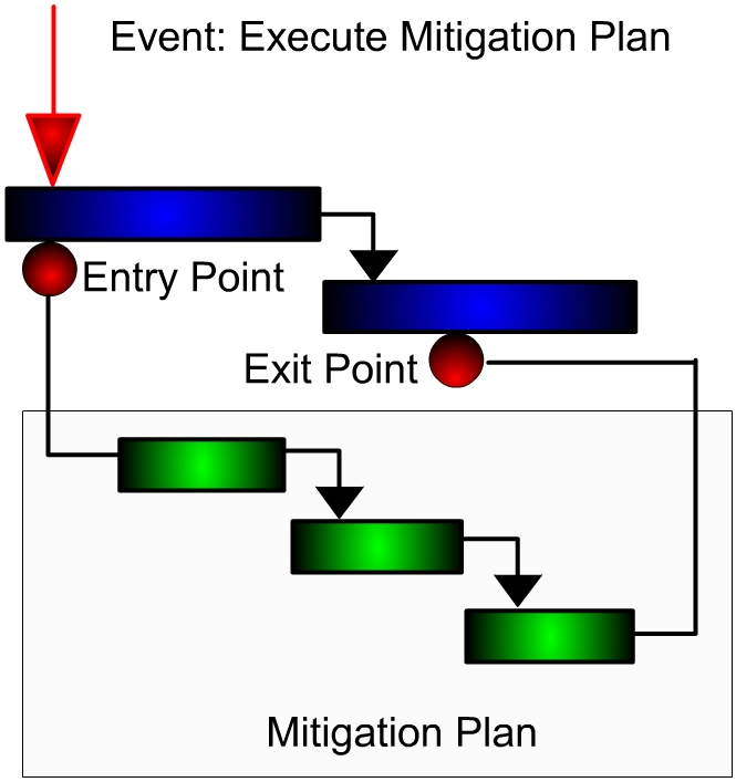 Mitigation Plan